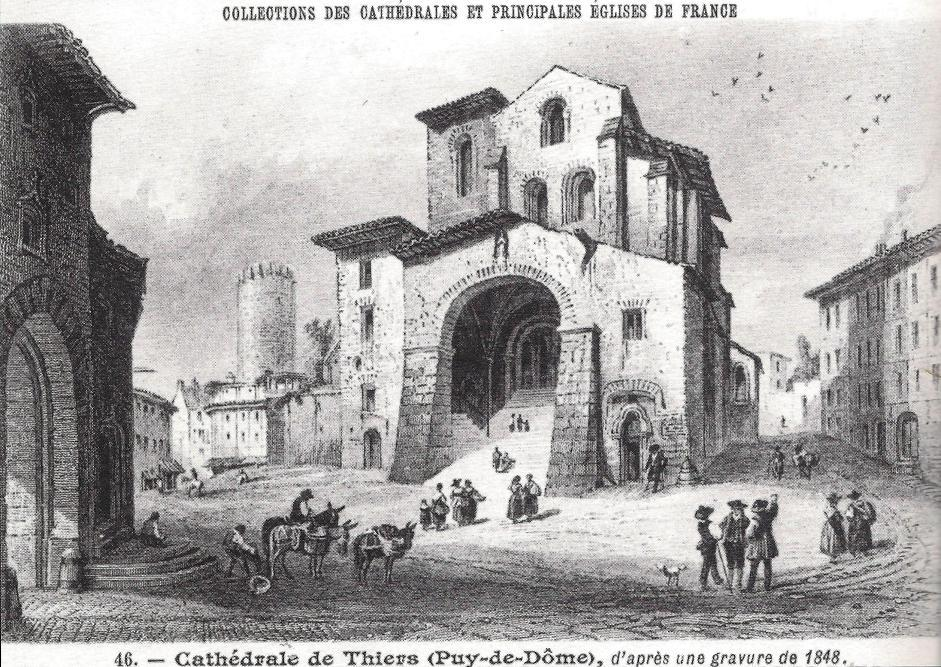 L'église Saint-Genès de Thiers en 1848 (façade occidentale)